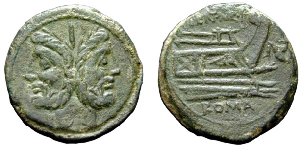 Асс, медь Дата чеканки: 100 г. до н. э. Монетный двор: Рим вес: 26.65 г АВЕРС: Голова Януса в лавровом венке; вверху I. РЕВЕРС: Корабельный нос вправо, перед ним фигура из трех ног, triquetra; вверху надпись LENT. MAR. F. (NT, MAR — монограммой) (Lentulus Marcelli filius), внизу ROMA.